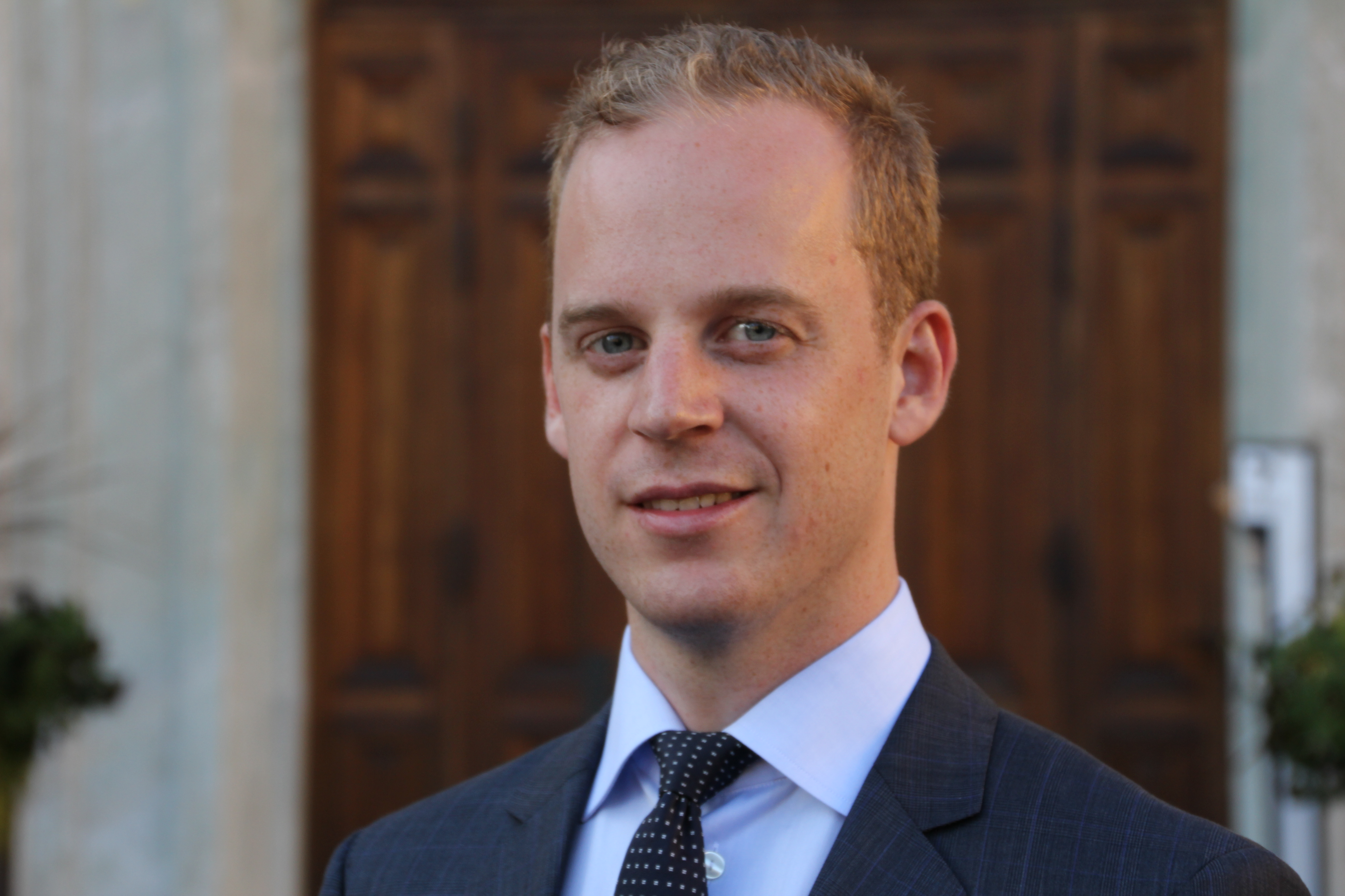 Gustav Kasselstrand var 2011-2015 SDU:s förbundsordförande.